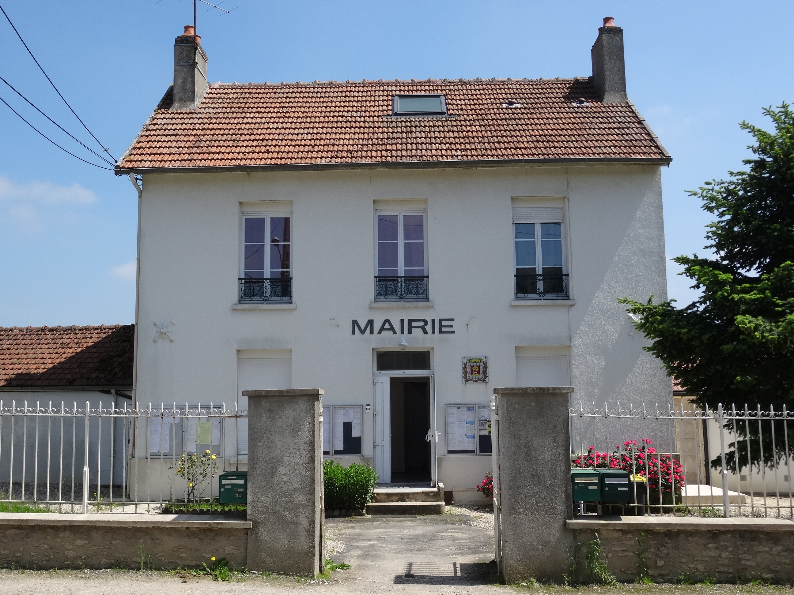 Mairie de Cucharmoy. (Seine-et-Marne, région Île-de-France).